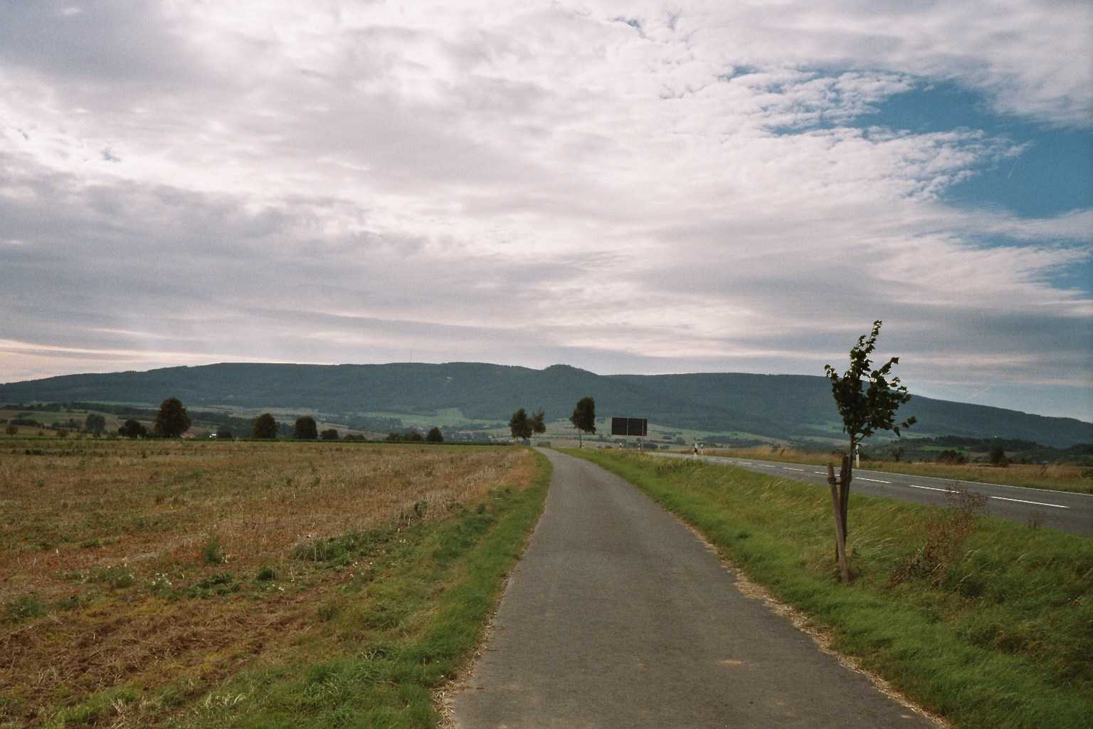 Der Hohe Meißner von Osten aus gesehen.